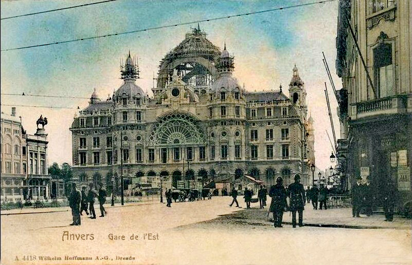 Gare d'Anvers-Est, le bâtiment voyageurs en construction au tout début des années 1900.